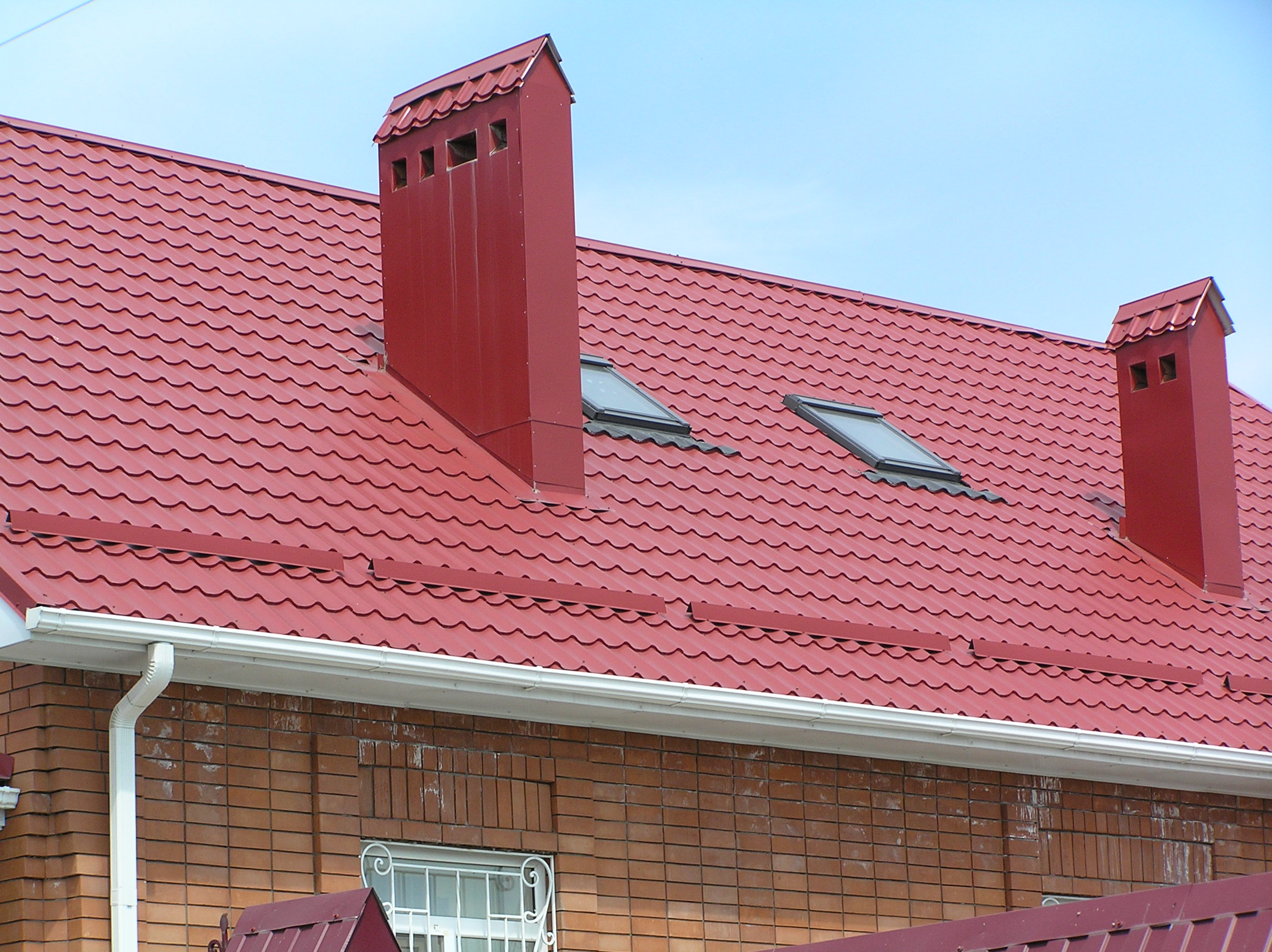 Водосточная система МП Модерн 3